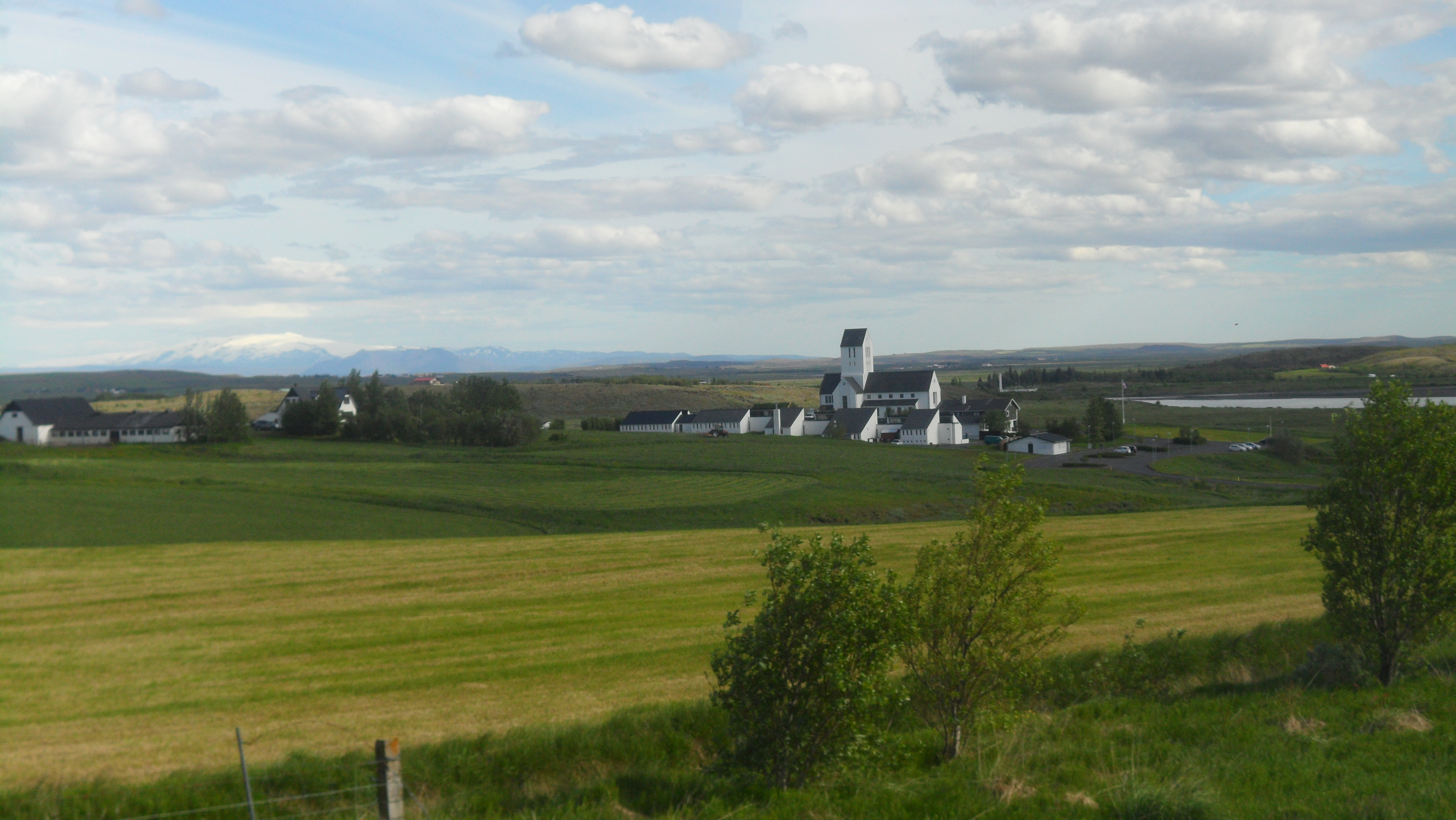 Skálholt, zgodovinsko in kulturno mesto, Islandija.